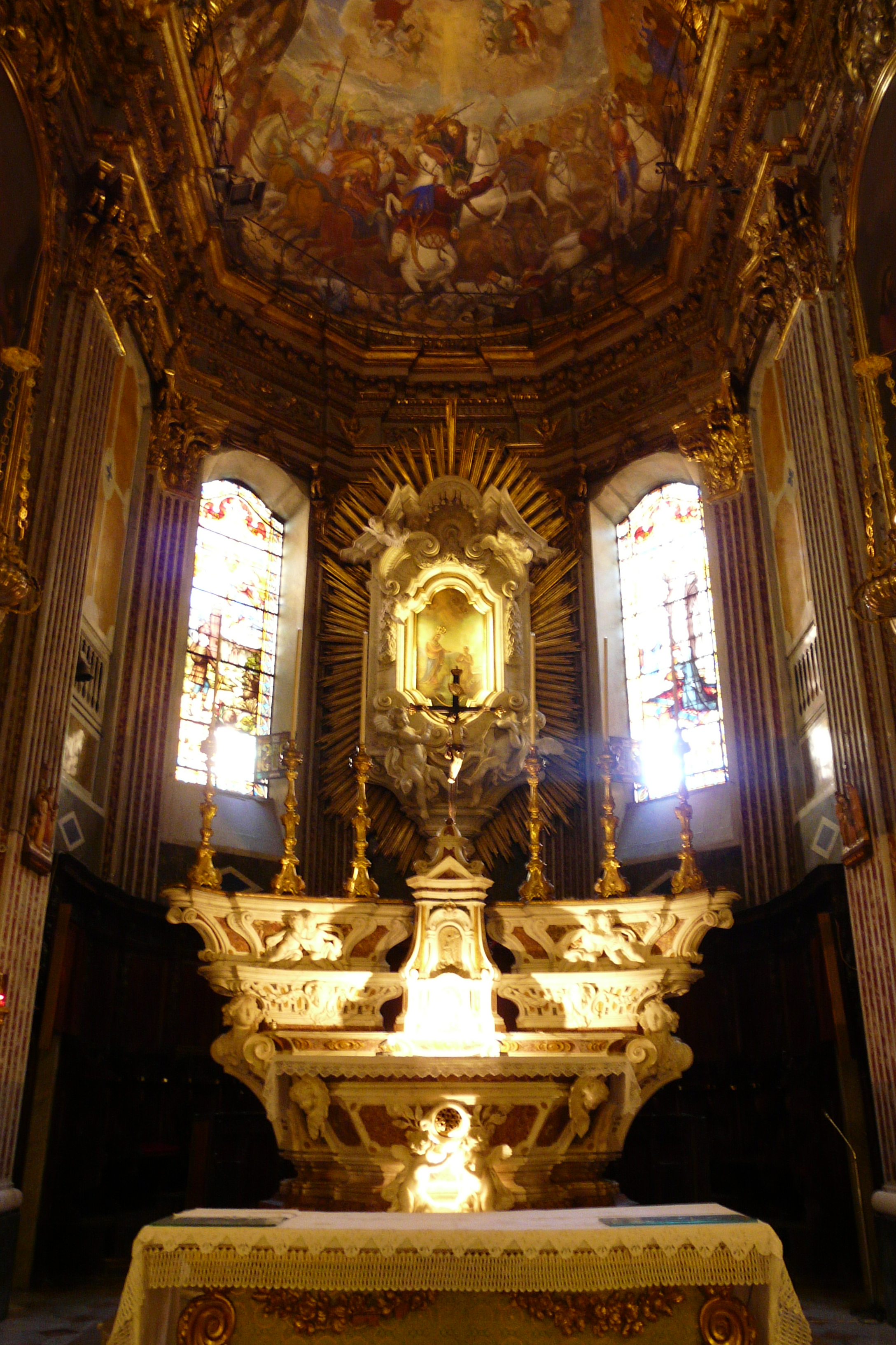 Chiesa di San Giacomo di Rupinaro, Chiavari, Liguria, Italia